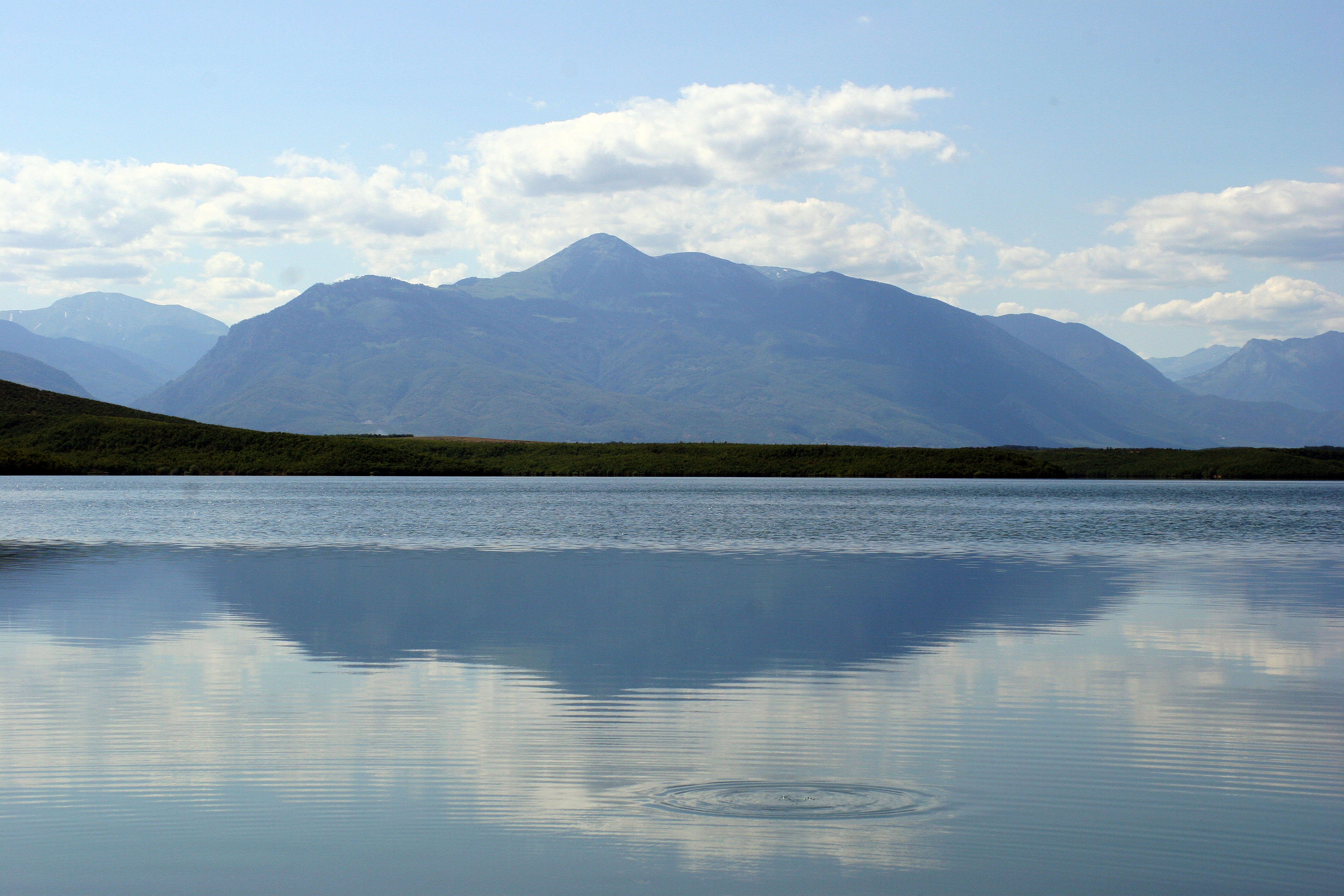 Liqeni i Radoniqit është një liqe artificial në komunën e Gjakovës. I krijuar në vitet e '80-ta, liqeni mori emrin e fshatit i cili u përmbys për krijimin e tij. Radoniqi furnizon me ujë rreth 214.000 banorë të qyteteve të Gjakovës dhe Rahovecit si dhe fshatrave përreth. Ai po ashtu përdorët për ujitjen e 10,500 ha tokë. Me një sipërfaqe prej 5.62 km2, Radoniqi zë vendin e dytë në Kosovë për nga sipërfaqja. Kapaciteti i digës është 113 milion m3, që për momentin lejon furnizim të arsyeshëm me ujë gjatë tërë vitit.